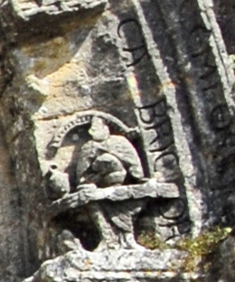 Fenioux, 5. Archivoltenbogen, rechts unten